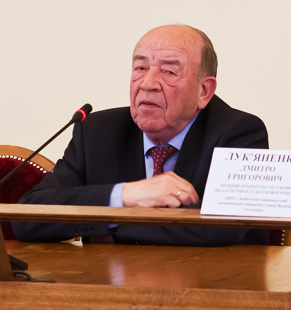 Ректор та Герой України А. Ф. Павленко